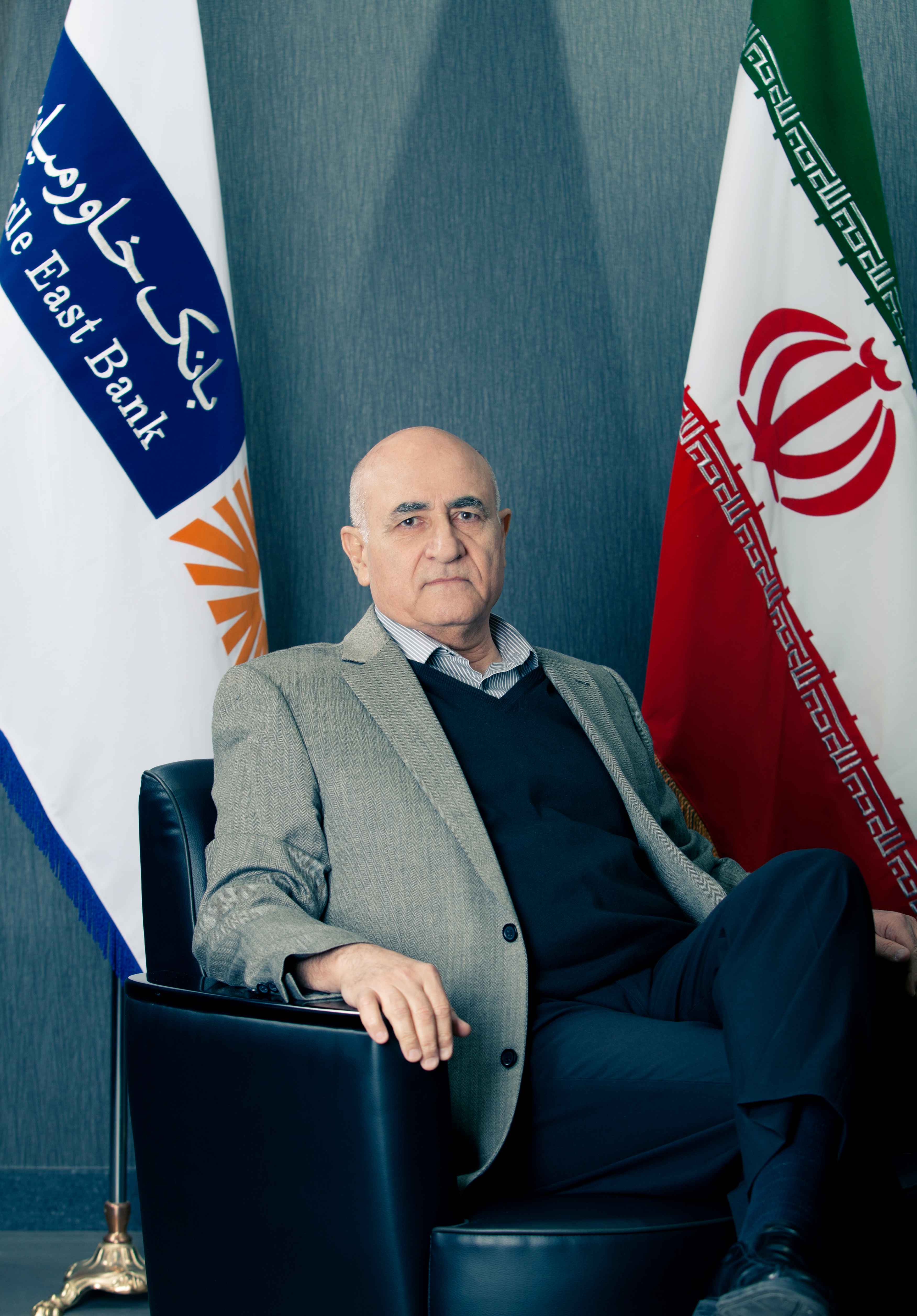 مدیر عامل و بنیان گذار بانک خاورمیانه